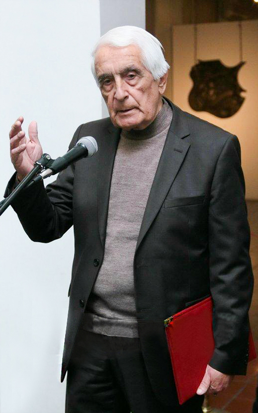 Фото с выставки